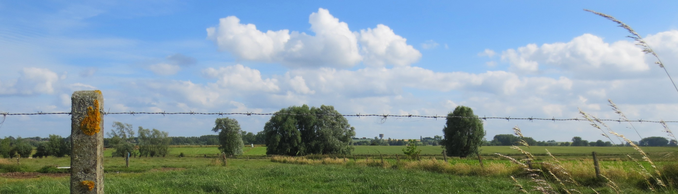 Ghoy-lez-Lessines